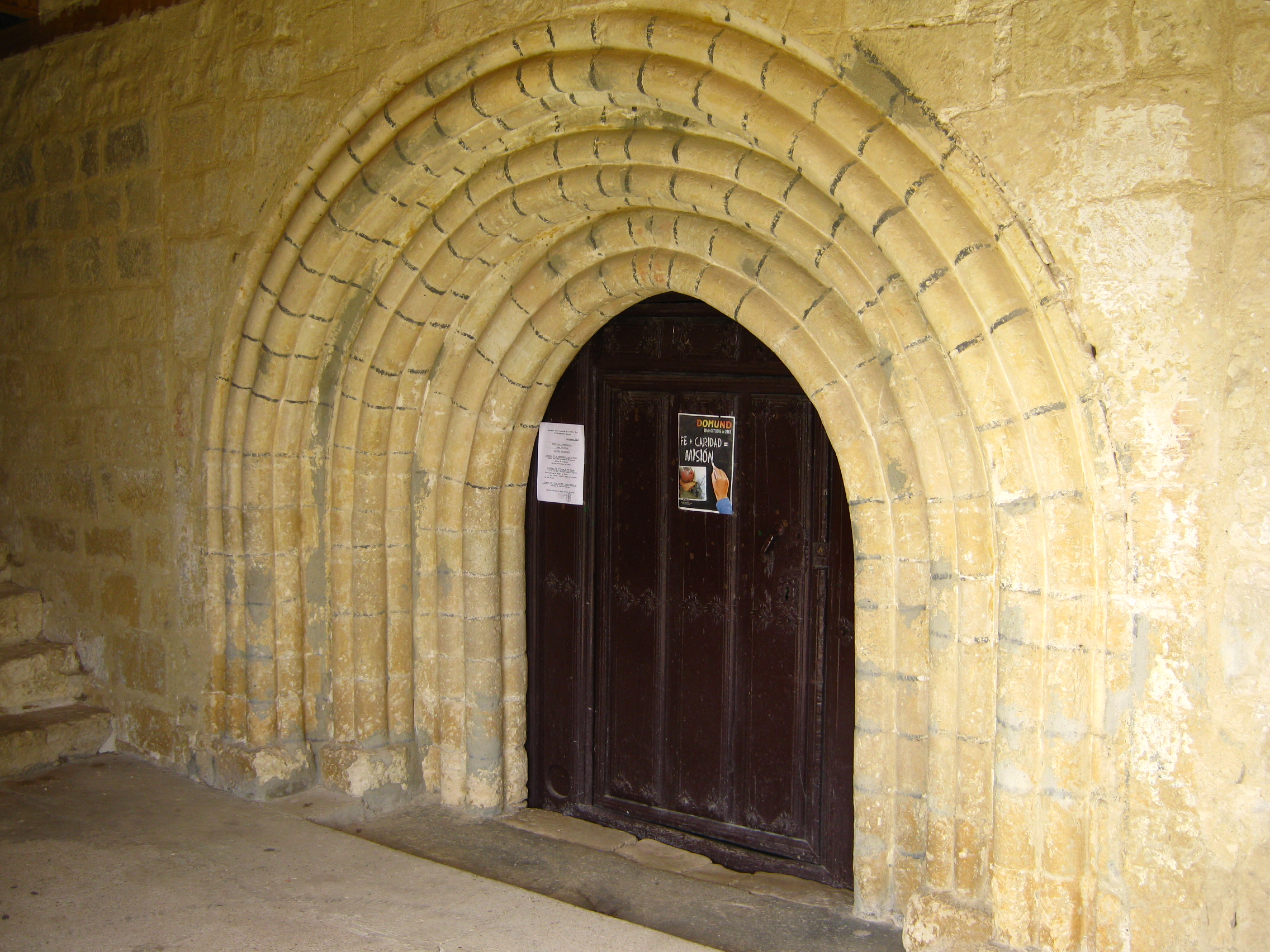 Portada de la iglesia de Extramiana, en la comarca de las Merindades (Burgos, Castilla la Vieja)